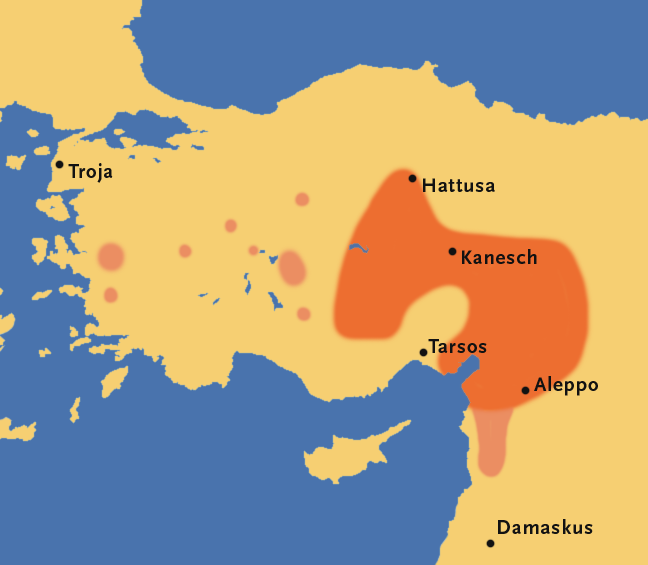 Luwian language region RZ